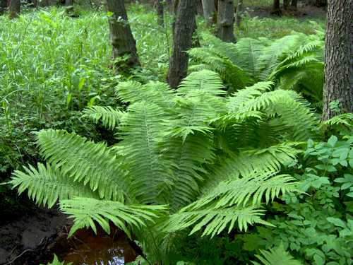 En bild från Gullringskärrets lägre del (vid ån), 18. juni 2005. Egentagen bild